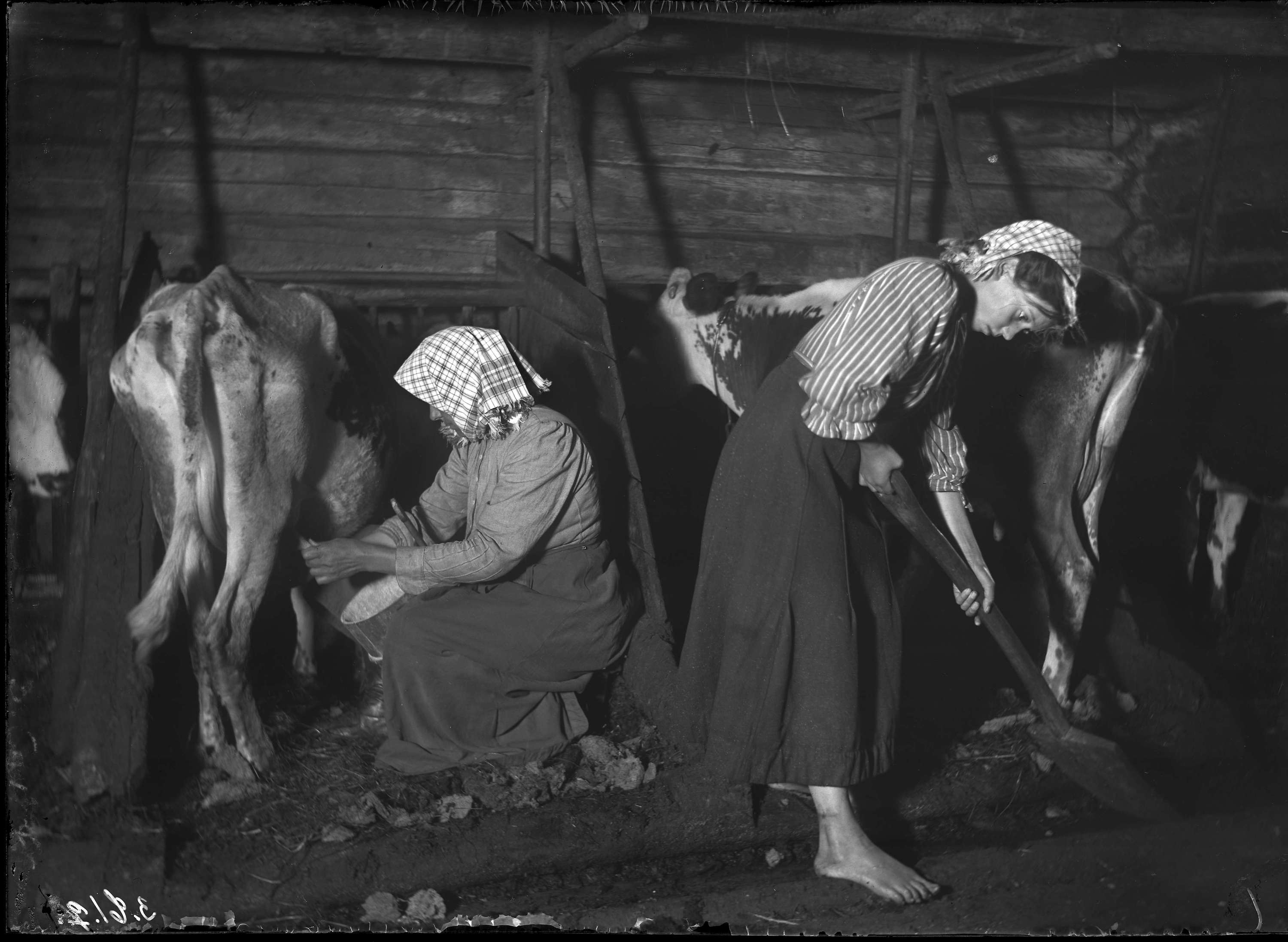 Depicted place: Värmland, Jösse hd, Mangskog (Sverige (SE))